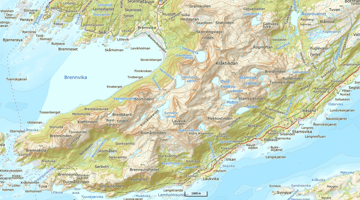 Kartutsnitt over Kråktindan og fjellene rundt